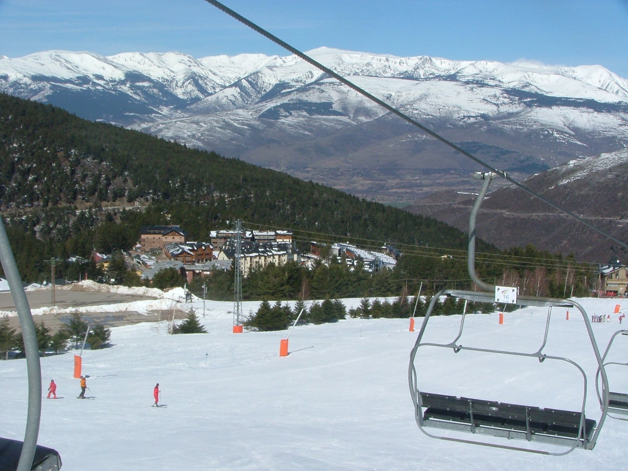 La Molina ski, Catalunya, Spain